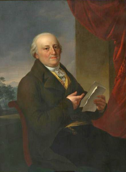 Christian Gottlob Frege II (1747-1816) auf einem Ölgemälde von Anton Graff